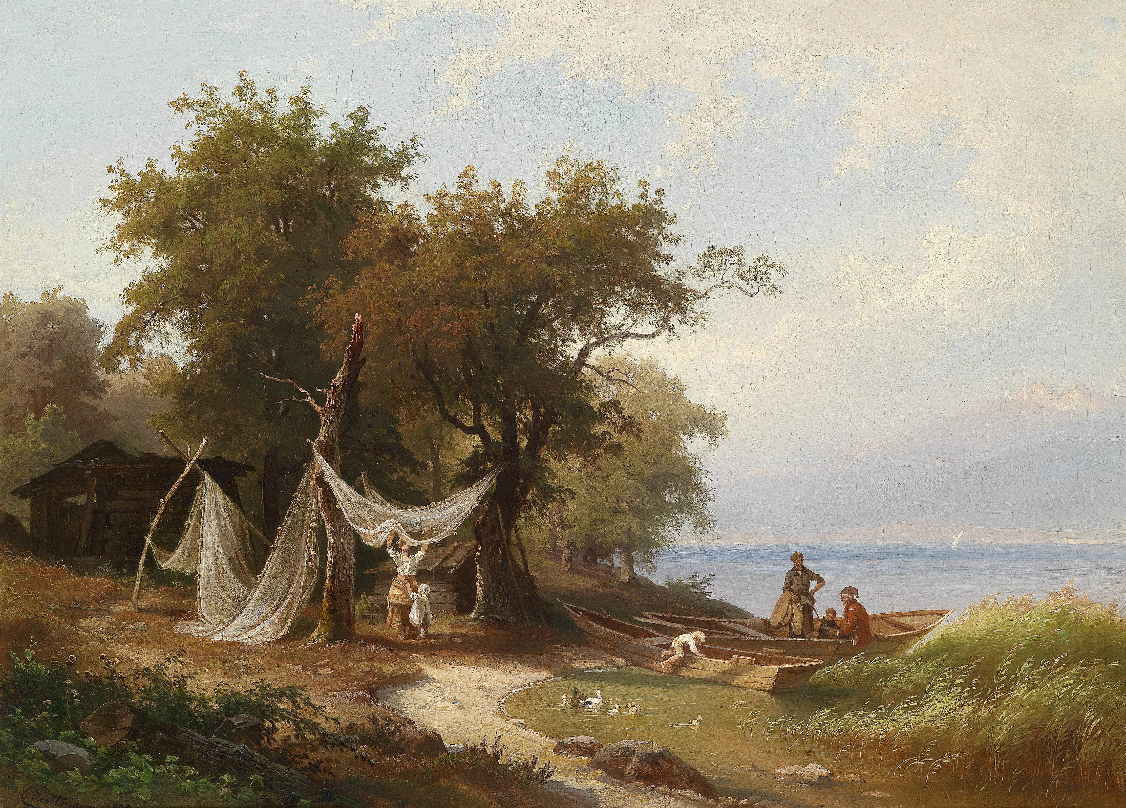 Fischerfamilie am Ufer des Genfer Sees, signiert und datiert C. Porttmann 1832, Öl auf Leinwand, 46,5 x 64 cm